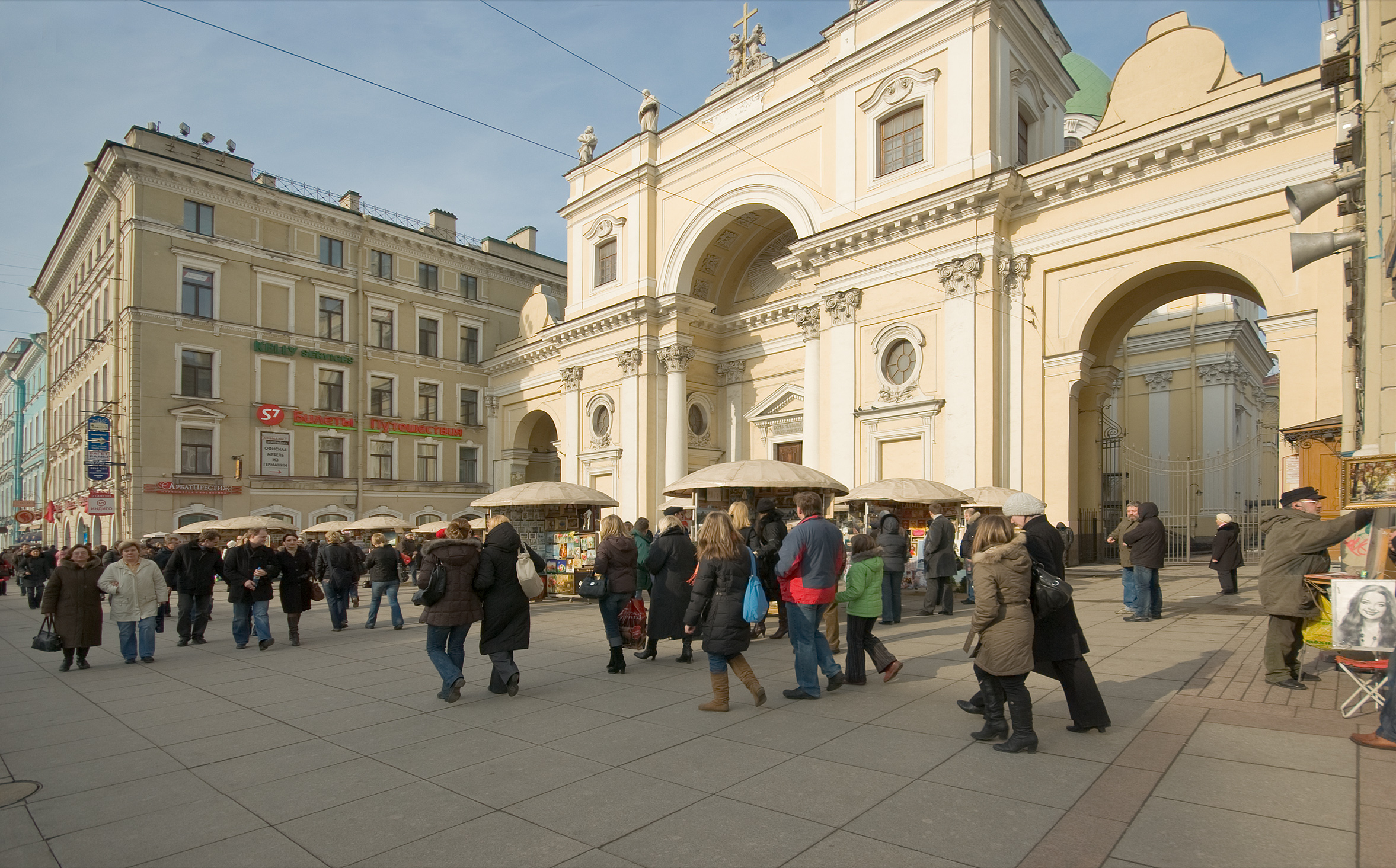 Санкт-Петербургу, Невский 32, 34 (Храм святой Екатерины Александрийской), арт-базар перед церковью